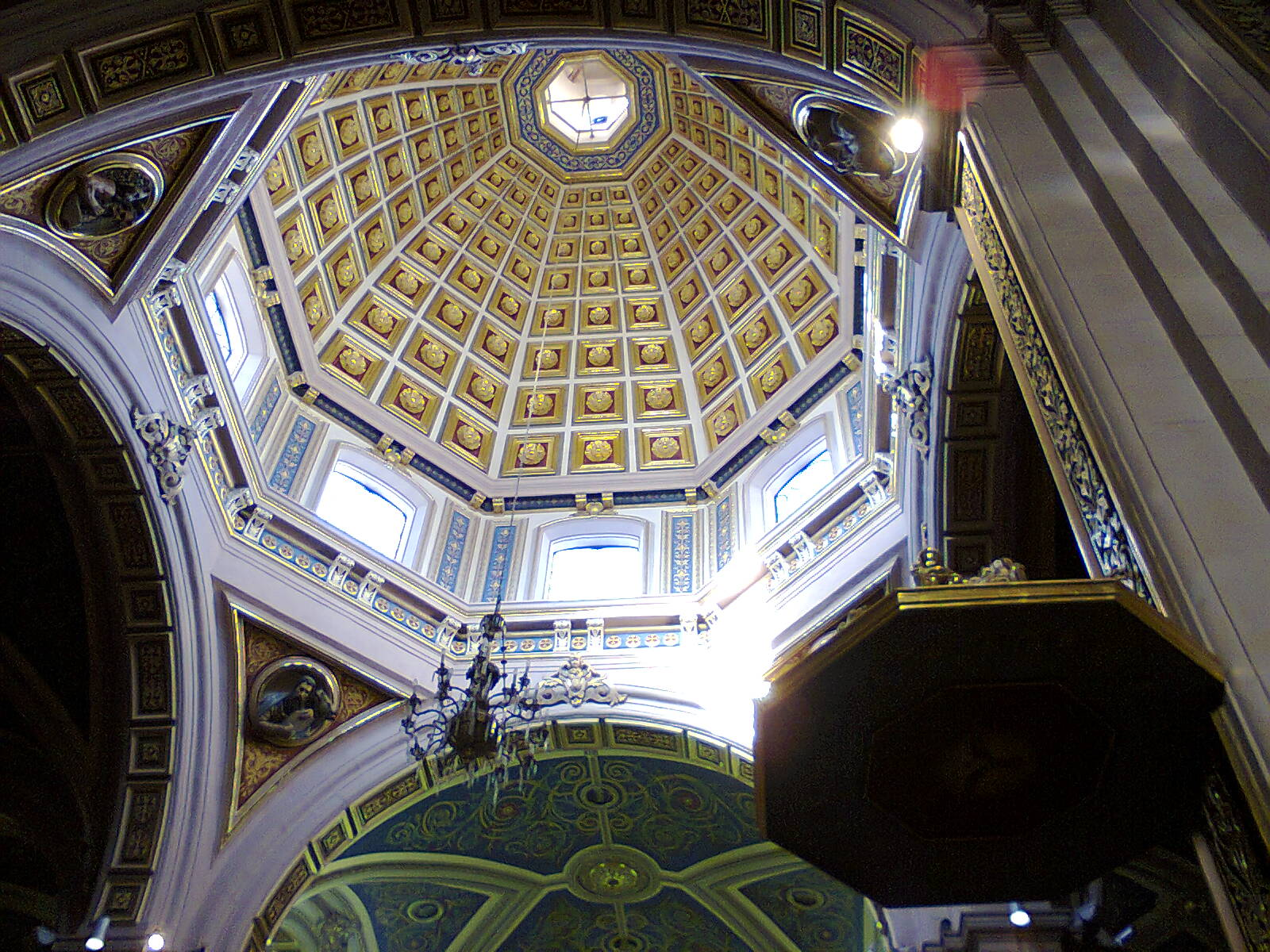 Cúpula de la Catedral